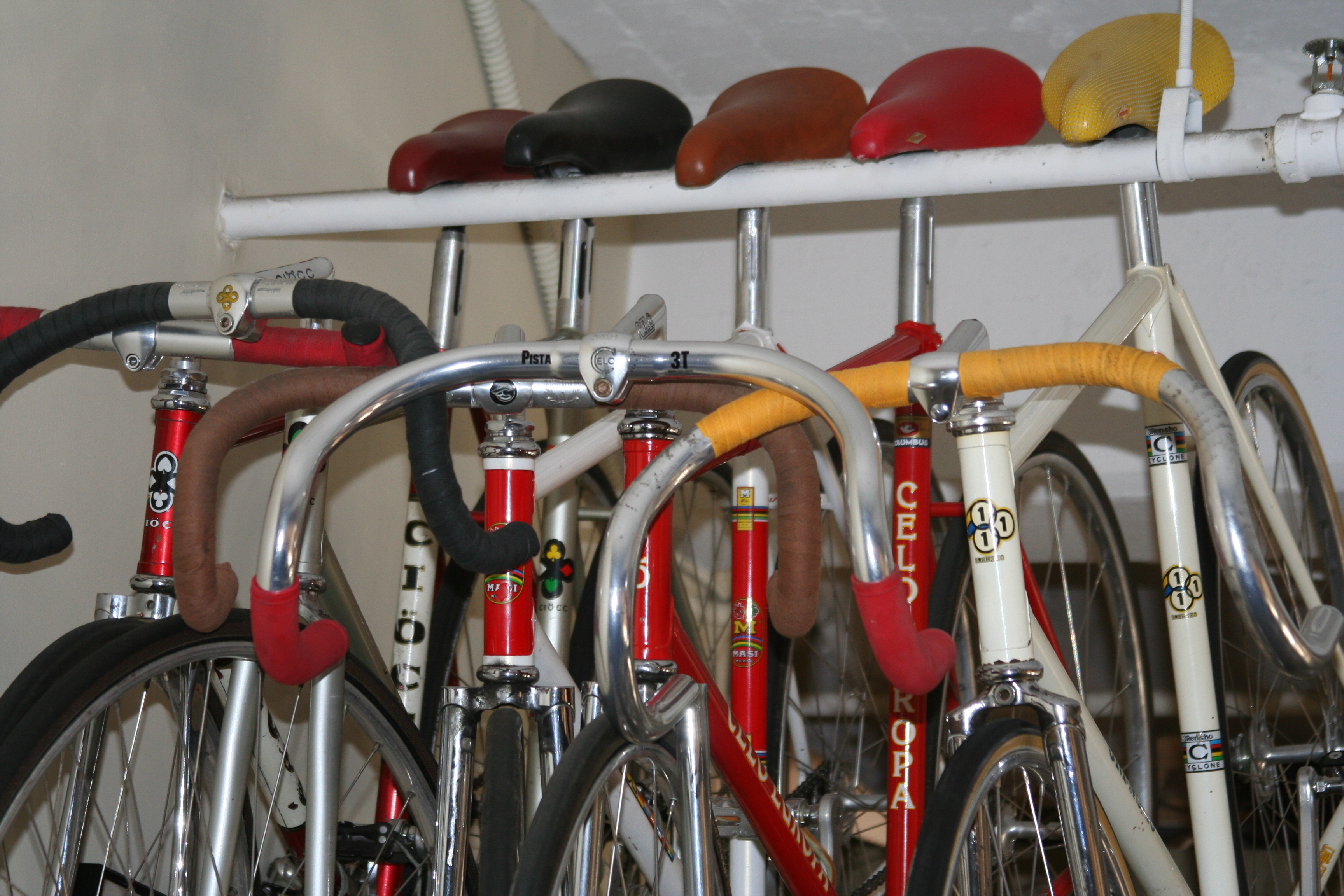 ciocc ciocc masi celo 3rensho